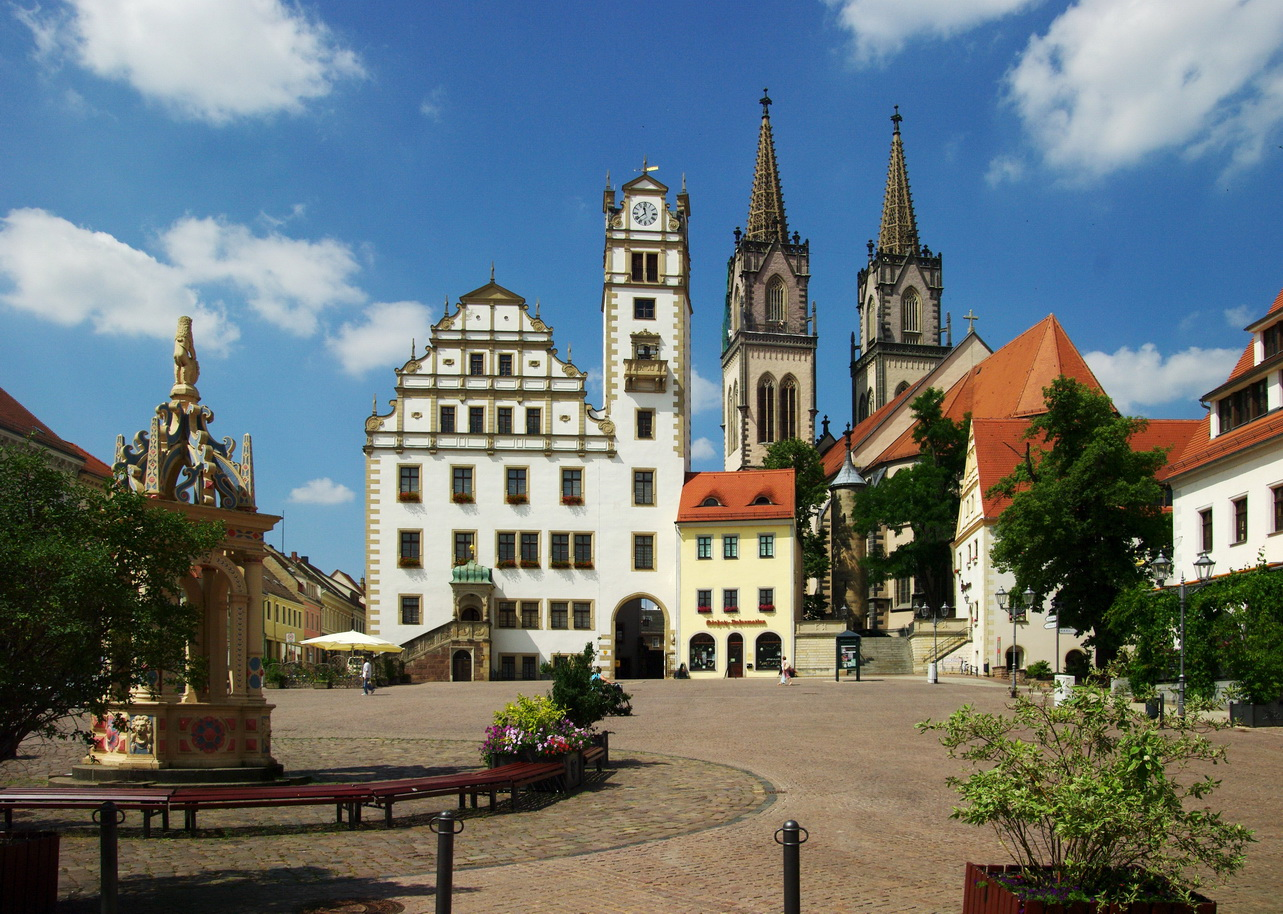 Neumarkt Oschatz mit Rathaus u. St. Ägidius